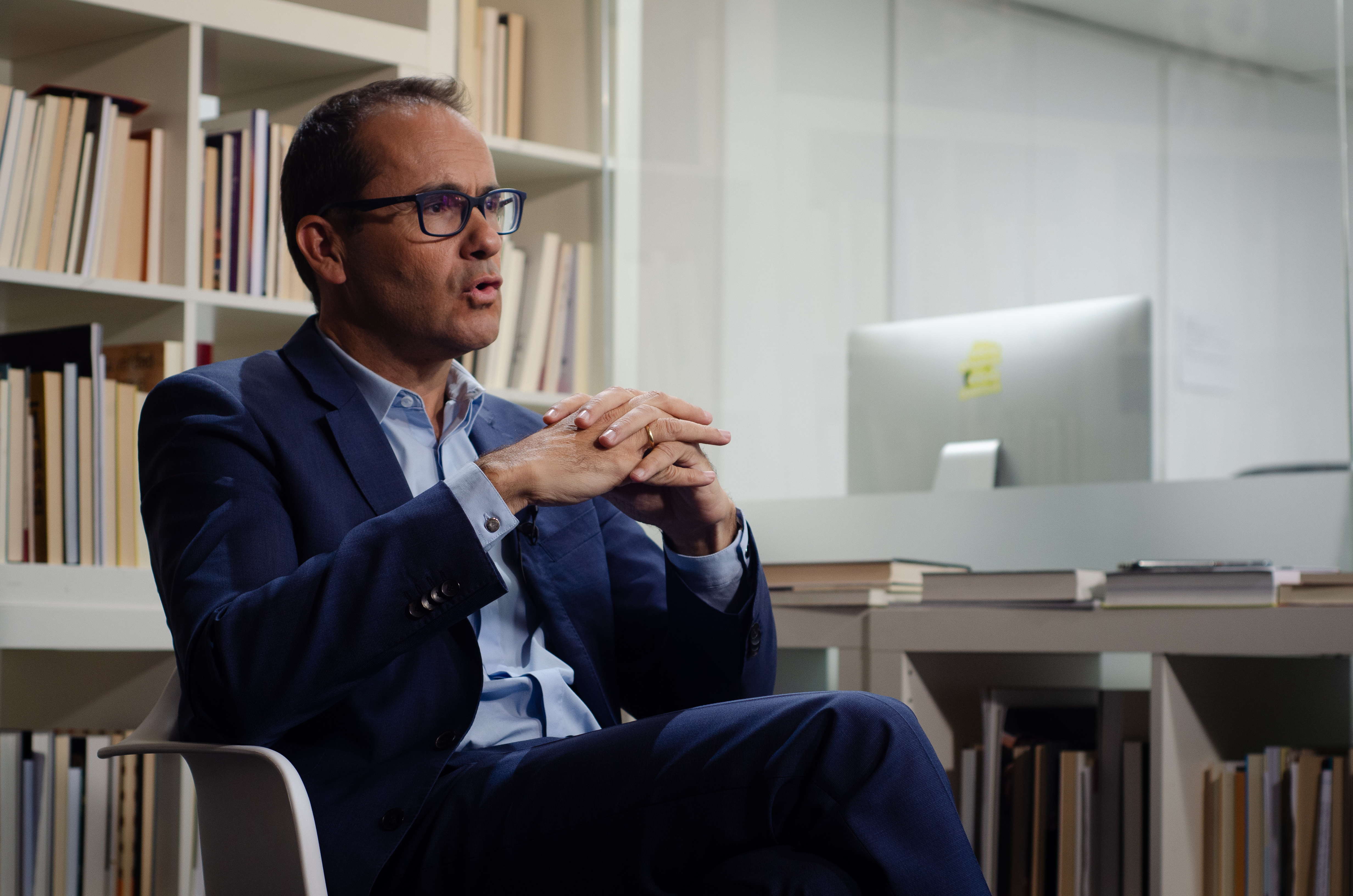 "Los años de Rajoy fueron el mayor ataque a la libertad de prensa desde la dictadura", dice el exdirector de El Mundo, que estrena libro sobre su experiencia. Jiménez desvela que el Gobierno pidió quitar a la redactora que cubría el PP y cómo Santamaría y Cospedal colocaban tertulianos en las teles para atacarse. En El Director relata cómo las élites económicas presionaron para atacar a Podemos para que no llegase al Gobierno: "Creían que les quitarían las casas de la playa". Sus memorias de un año al frente de El Mundo recopilan las presiones de ministros y directivos del IBEX.